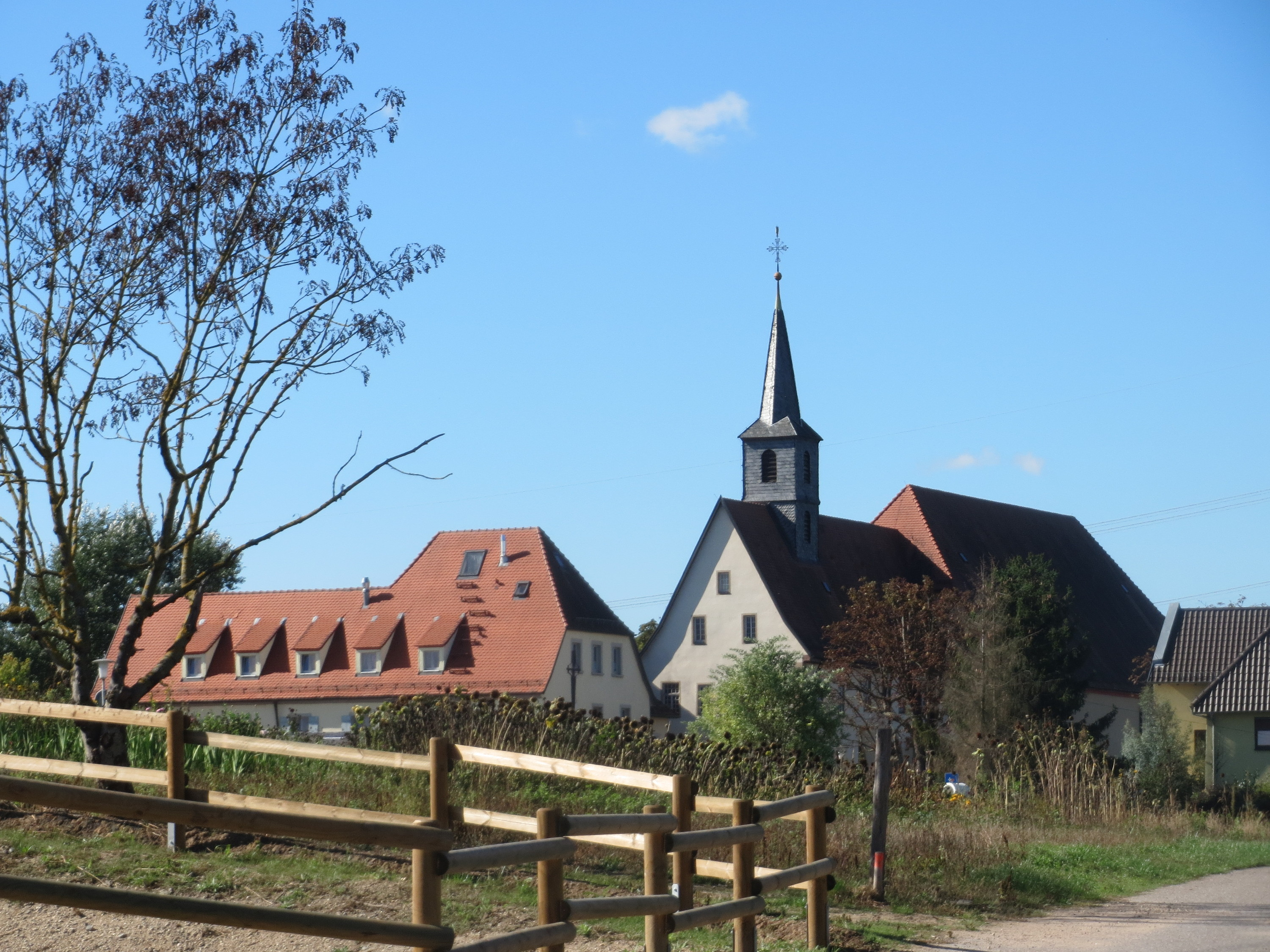 Wallfahrtskirche in Waghäusel